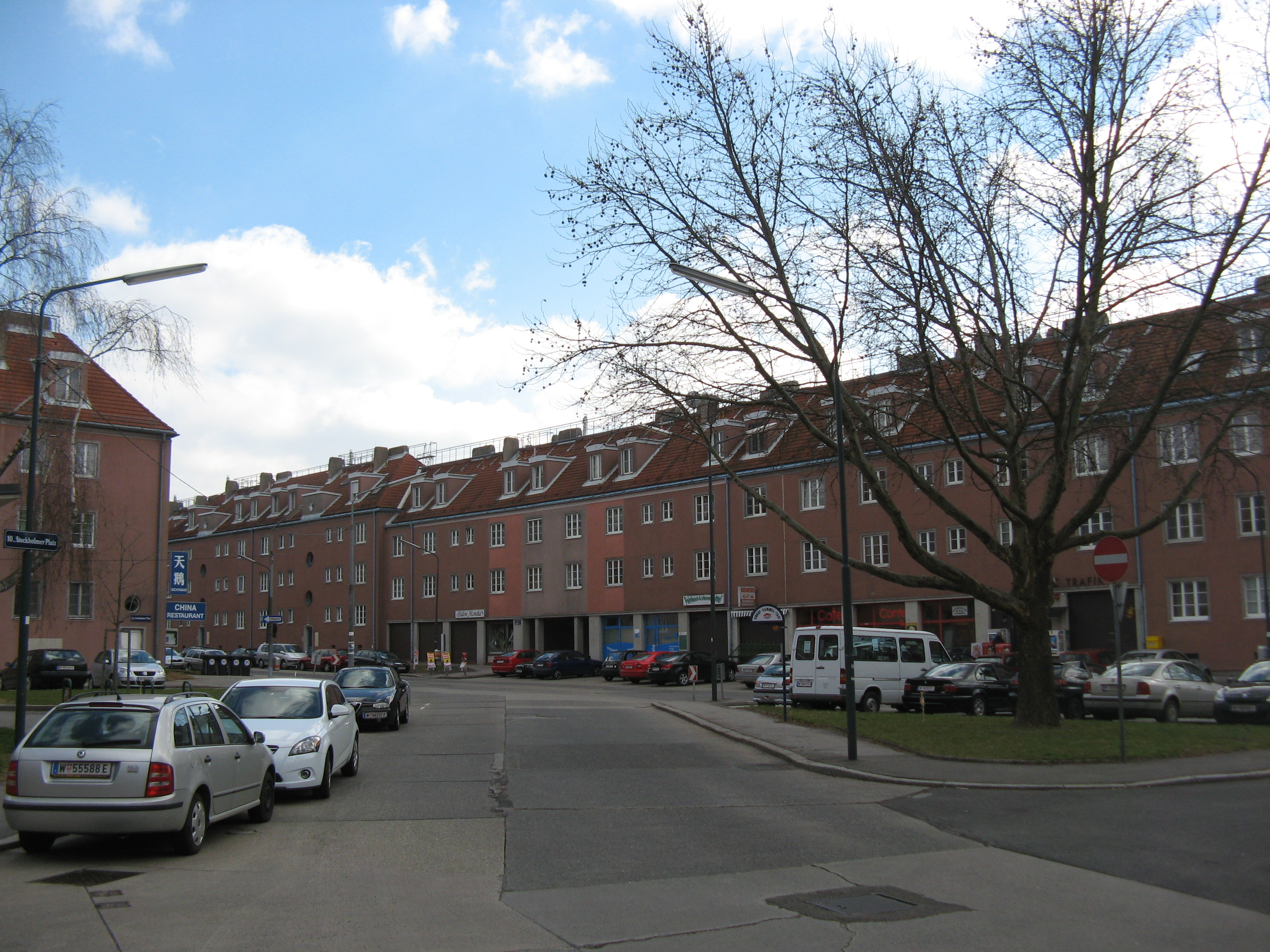 Städtische Wohnhausanlage (1947-51), Stockholmer Platz 1-17, Wien-Favoriten